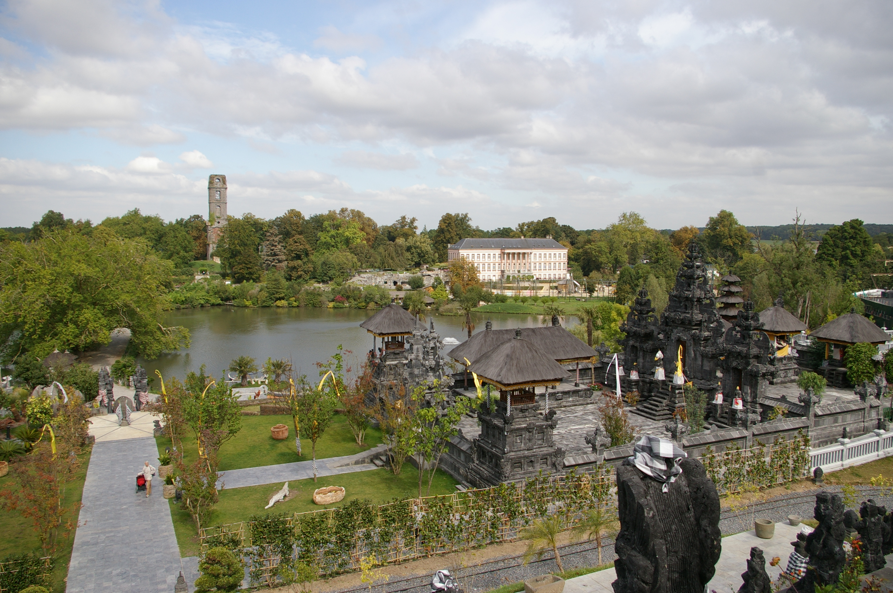 Vue générale du Pairi Daiza et Temple Pura Agung Santi Bhuwana